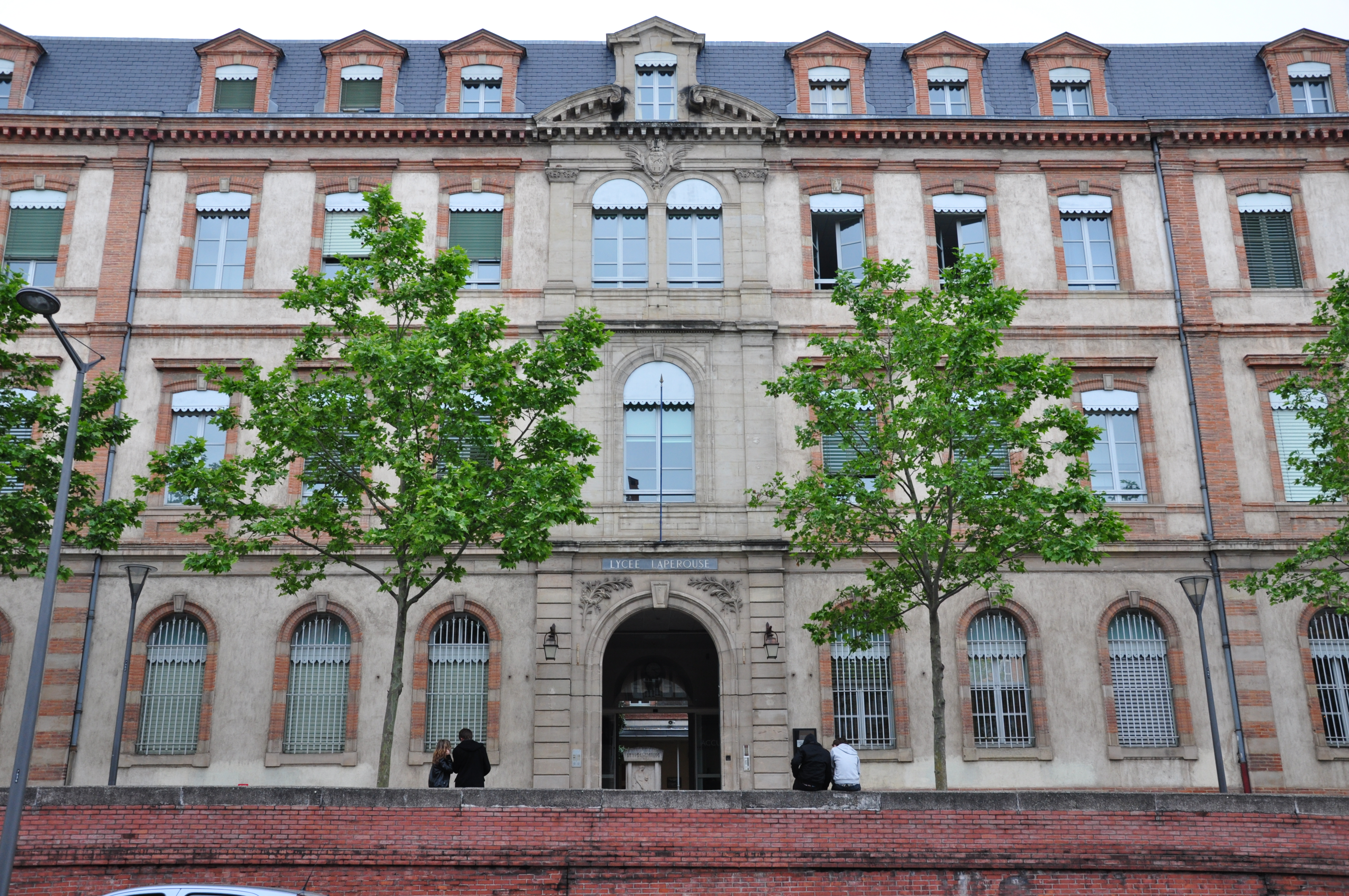 Lycée Lapérousechapelle de l'ancien collège des Jésuites, 2 lices Georges-Pompidou (Inscrit, 1957) .